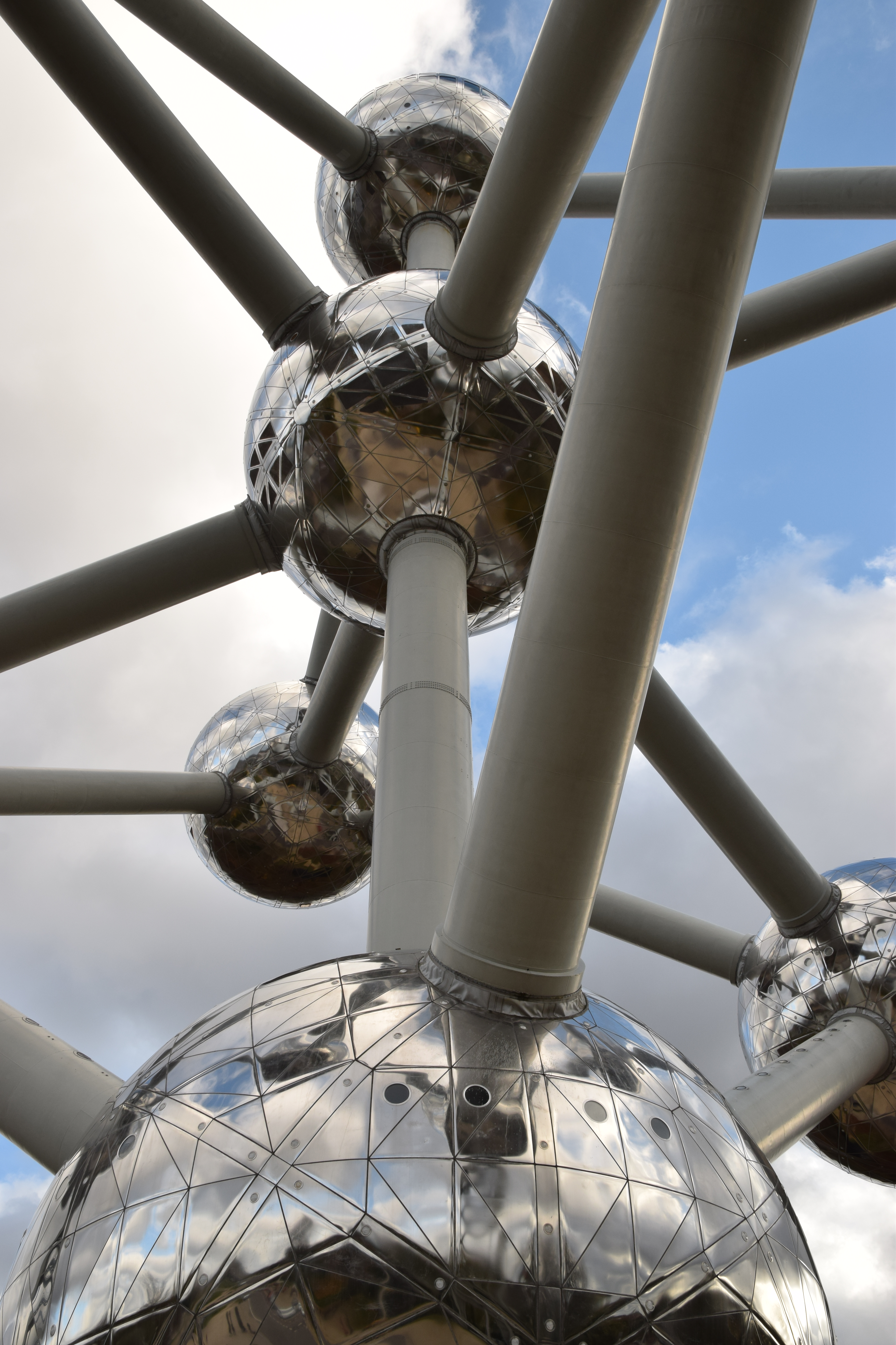 Enkele bollen van het Atomium